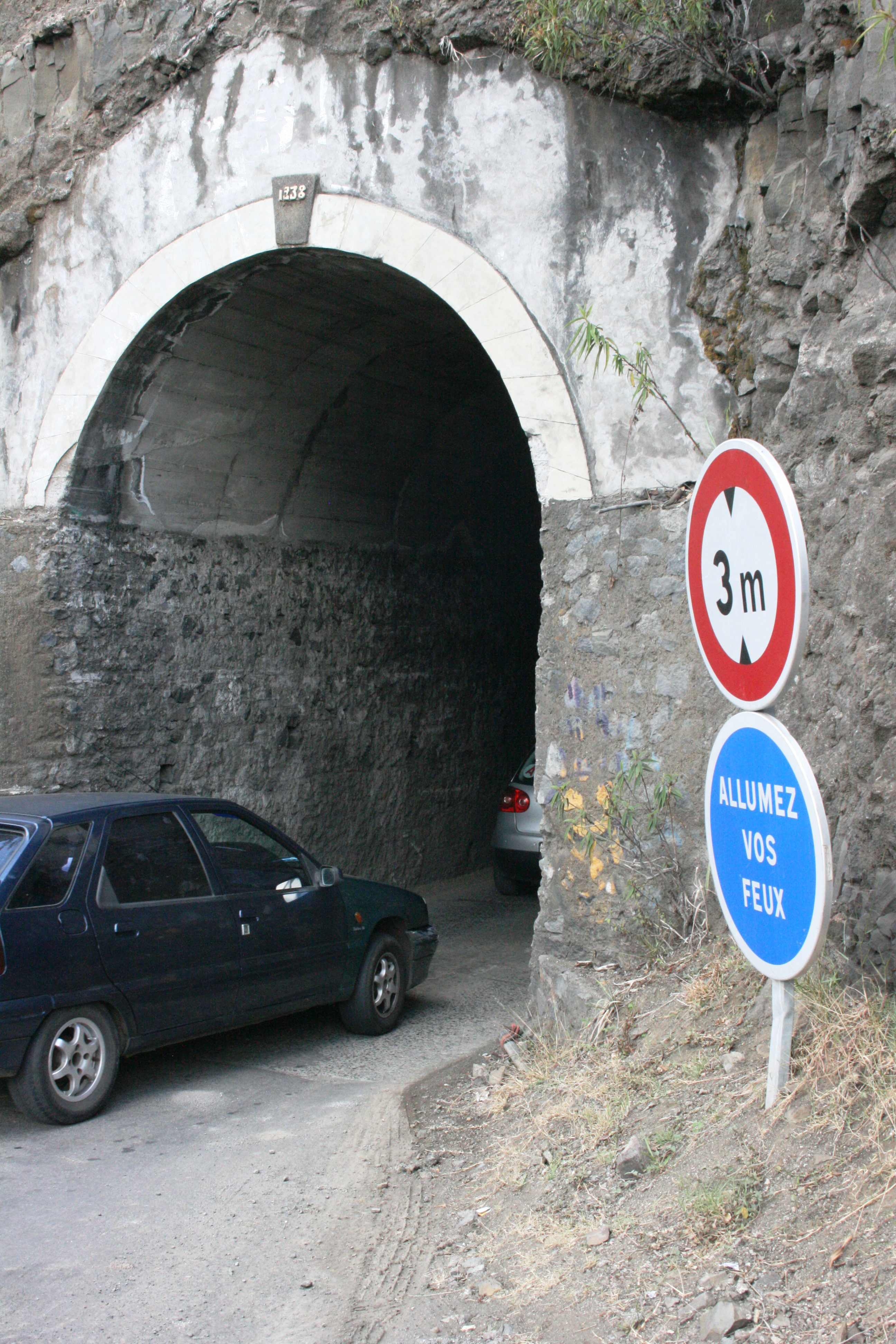 Véhicules pénétrant dans un tunnel de la route nationale 5 à Cilaos, sur l'île de La Réunion.